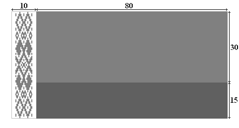 Diseño de la bandera de Bielorrusia The flag of Belarus construction sheet. Flag and graph drawn by User:Zscout370.